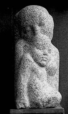 Shelomo Selinger a gagné le prix Neumann pour cette oeuvre en 1958. Elle fait partie de la collection du musée d'art moderne de la Ville de Paris.